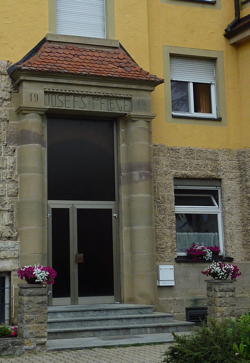 Eingang zur Josephspflege in Mulfingen